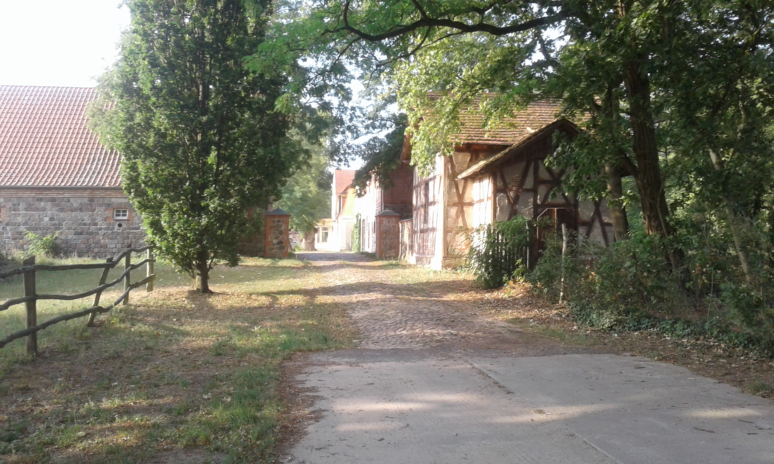 Gutshof